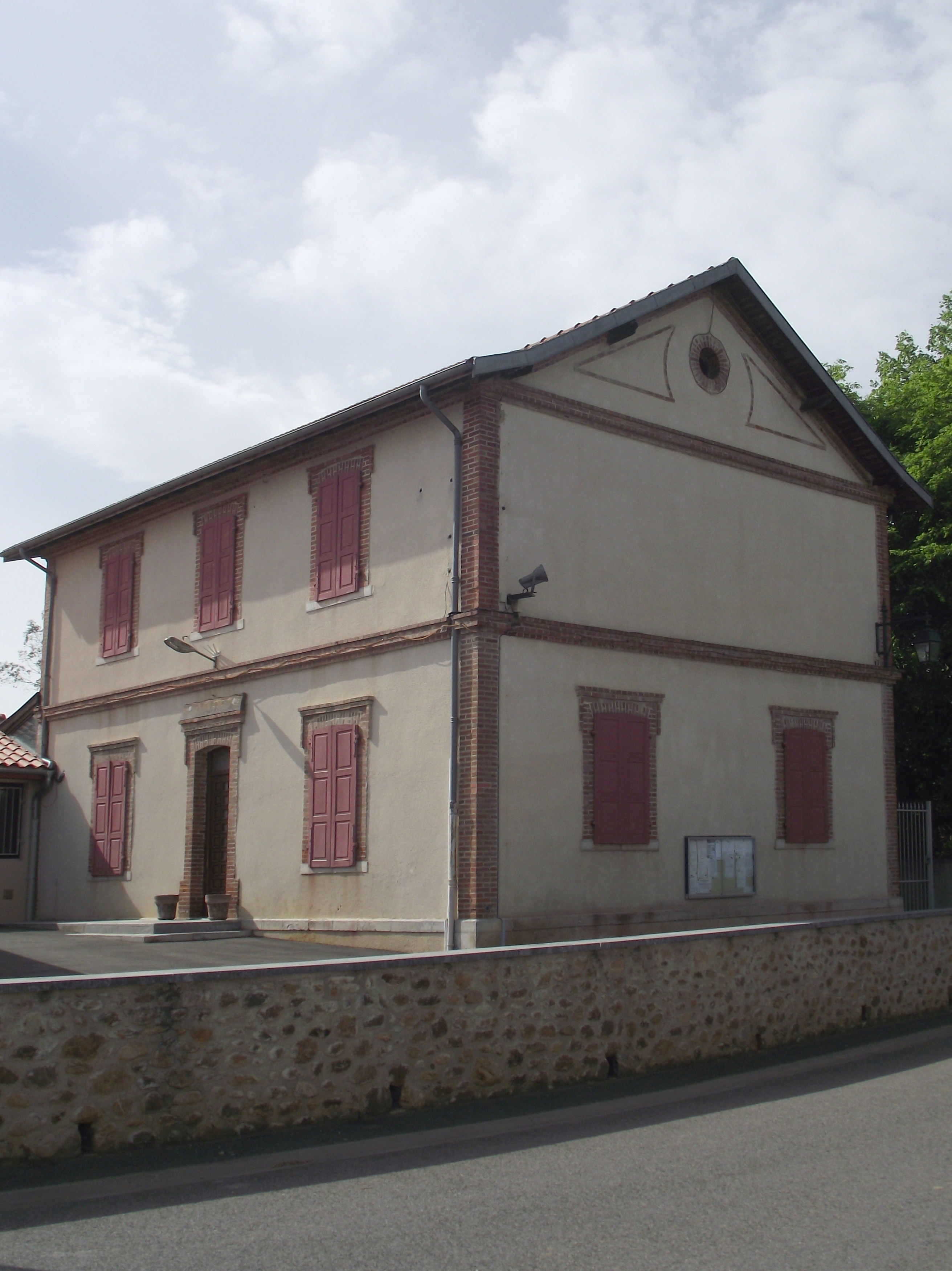 Mairie de Clarens (Hautes-Pyrénées, France)